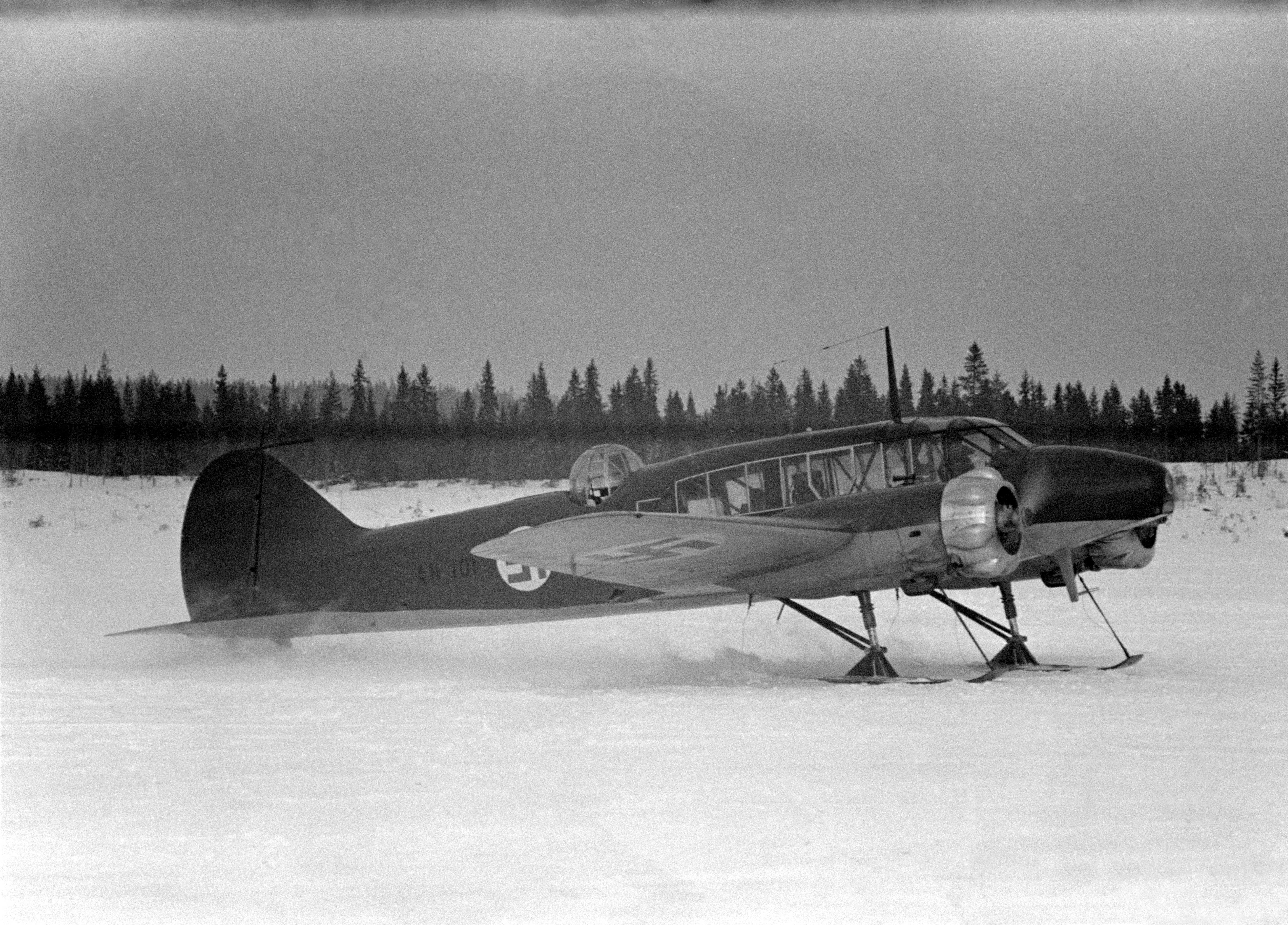 AN-101 tiedustelu ja pommikone Tikkakoskella Lent.laiv.46. (Kyseessä Avro Anson I koulukone Luonetjärvellä Tikkakoskella).